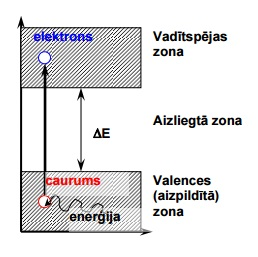 Pusvadītāju zonu shēma